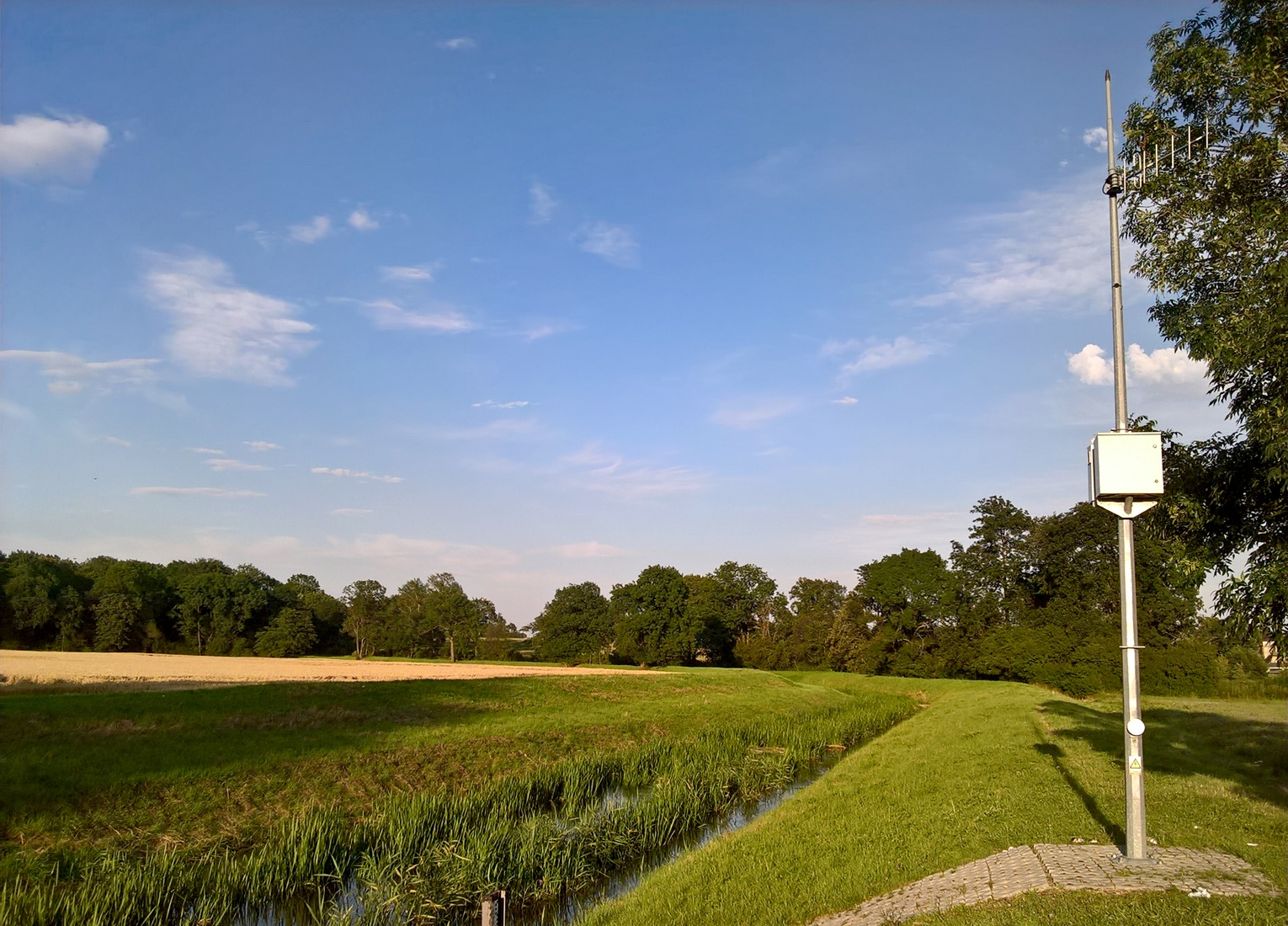 Stacja wodowskazowa IMGW-PIB w Borowie na Ślęzy